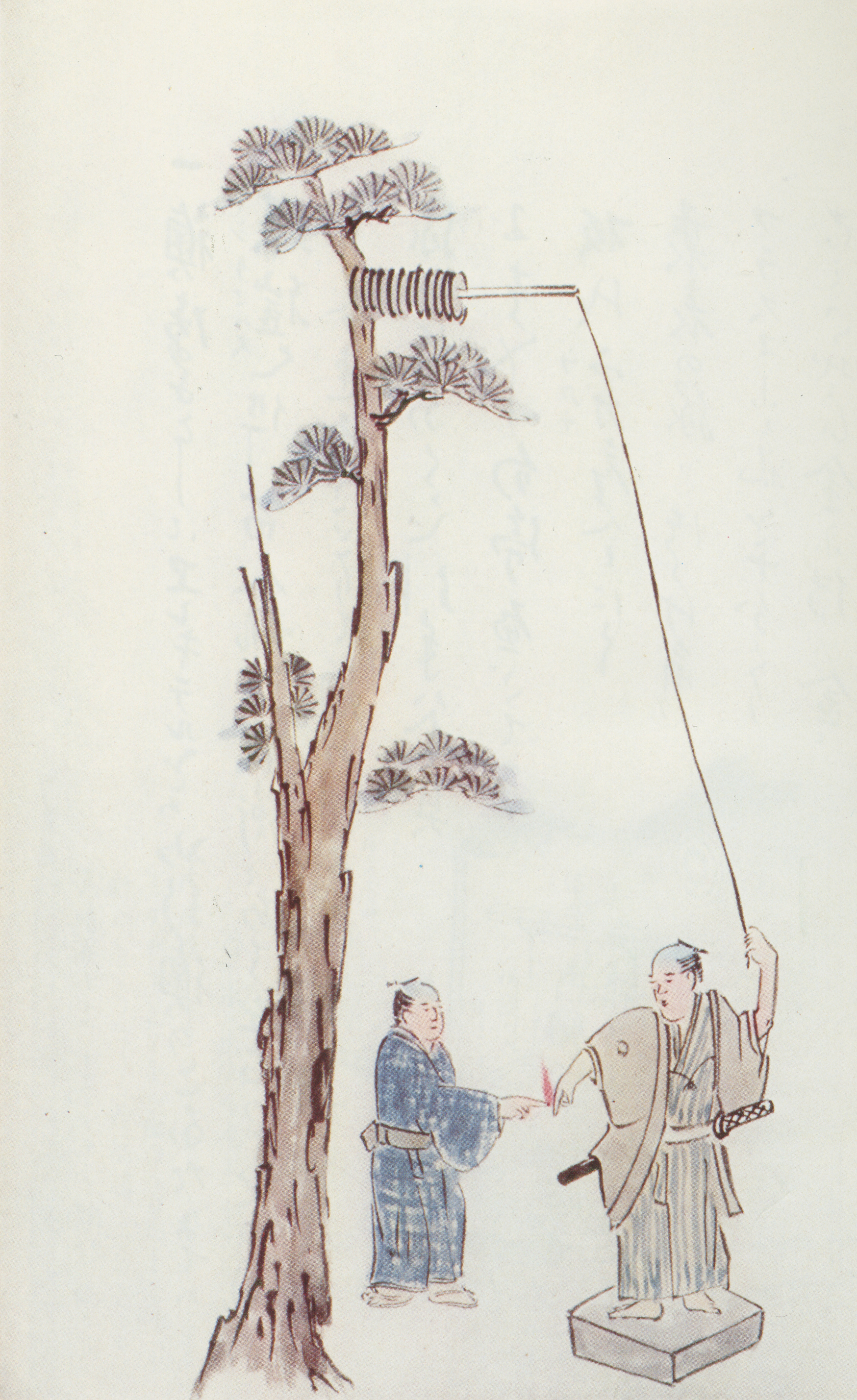 橋本宗吉著「阿蘭陀始制エレキテル究理原」のエレキテルによる落雷集電実験の絵